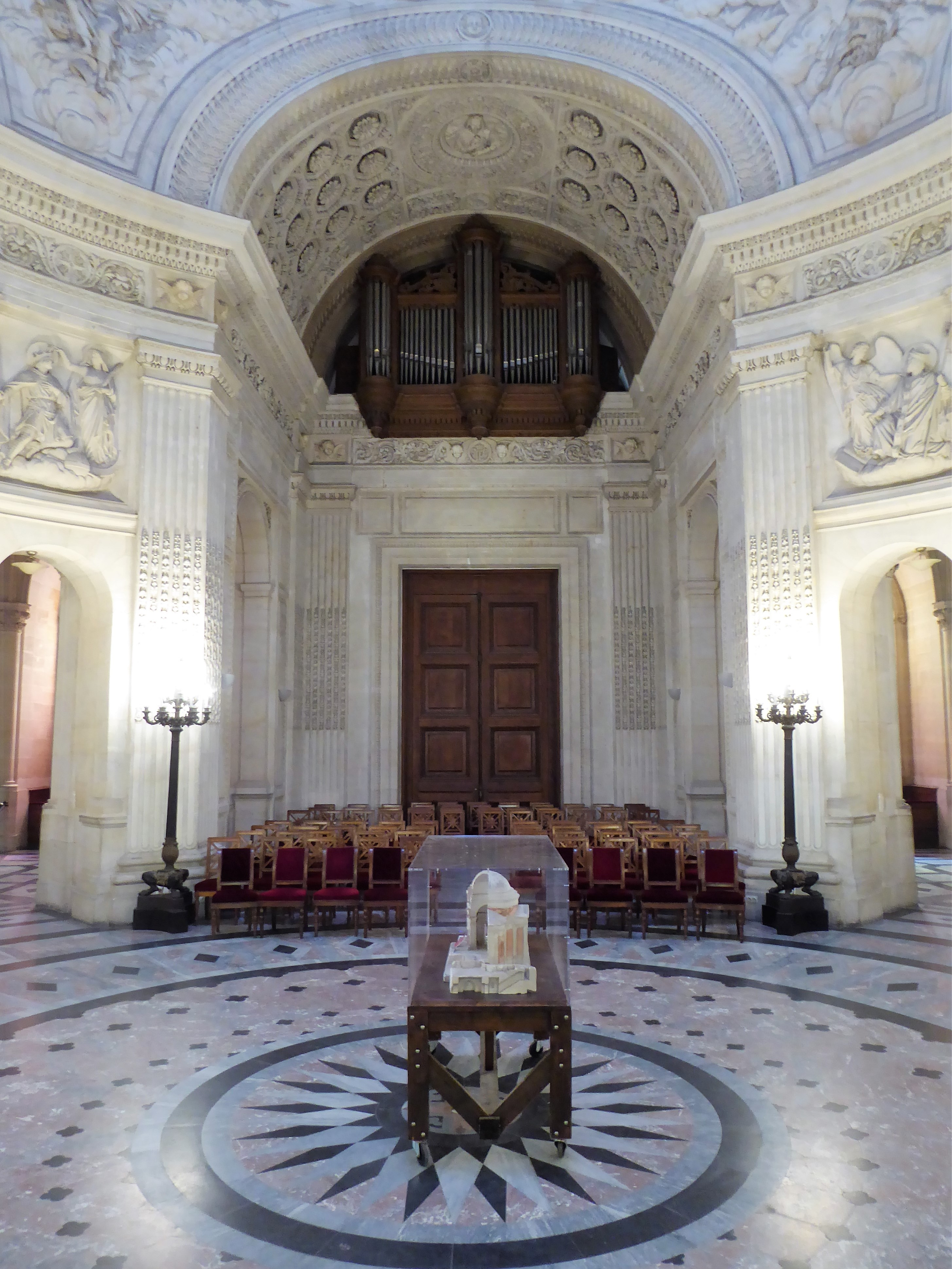 Intérieur de la chapelle royale de Dreux, Eure-et-Loir, France. Orgue Cavaillé-Coll.